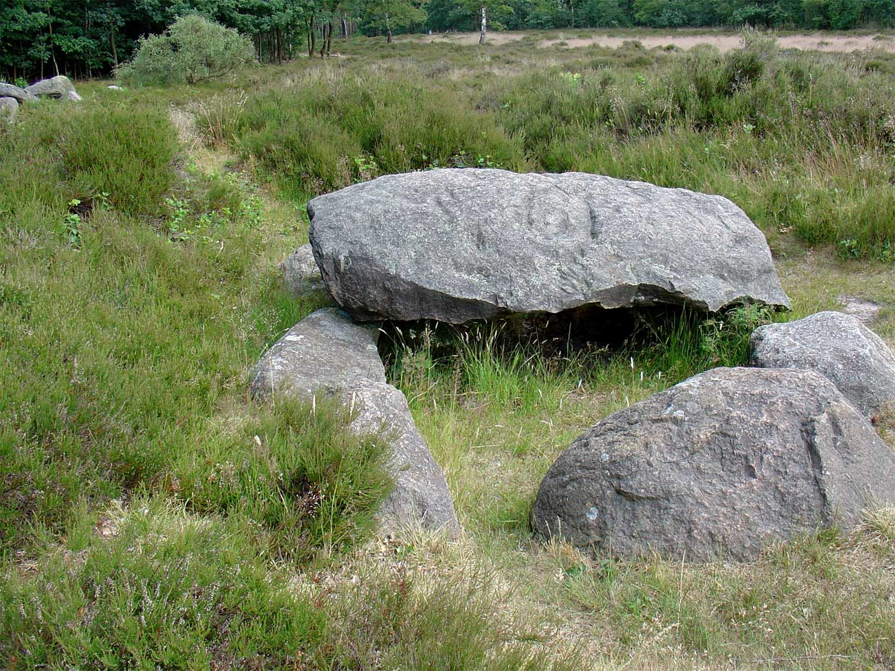 Hunebed D39 in het Valtherbosch bij Emmen